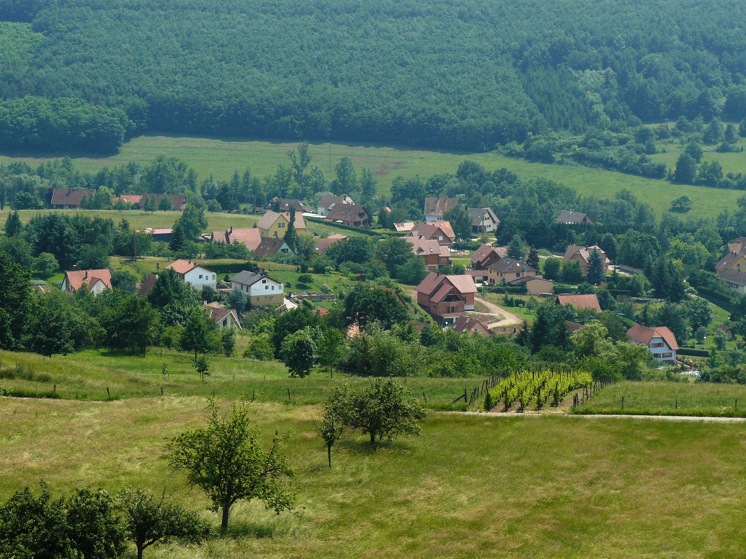 Vue sur Saint-Pierre-Bois depuis le Hohwarth